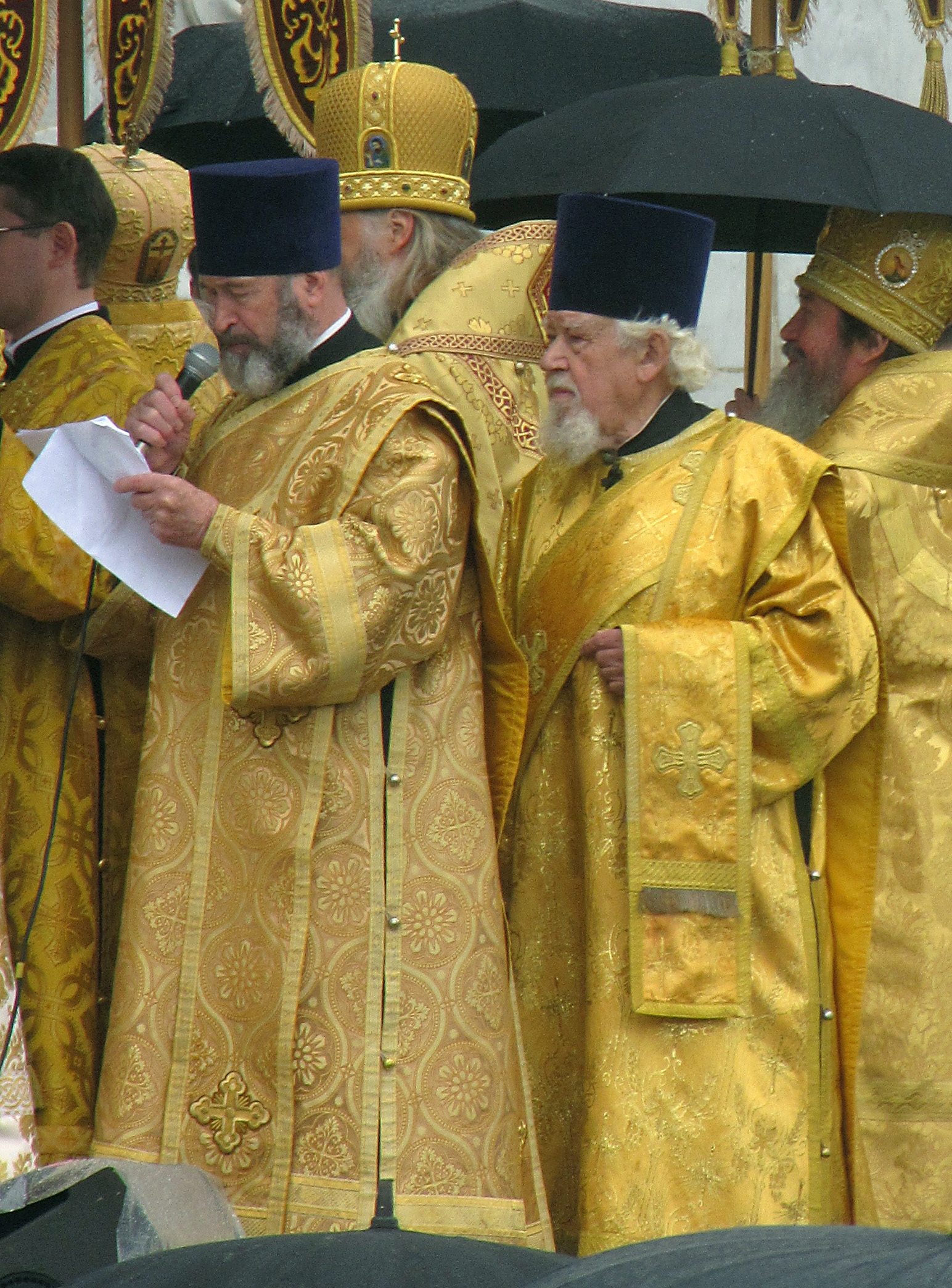 Протодиакон Владимир Назаркин и архидиакон Андрей Мазур на праздничной службе в честь 200-летия Отечественной войны 1812 года возле Храма Христа Спасителя. 9 сентября 2012 года